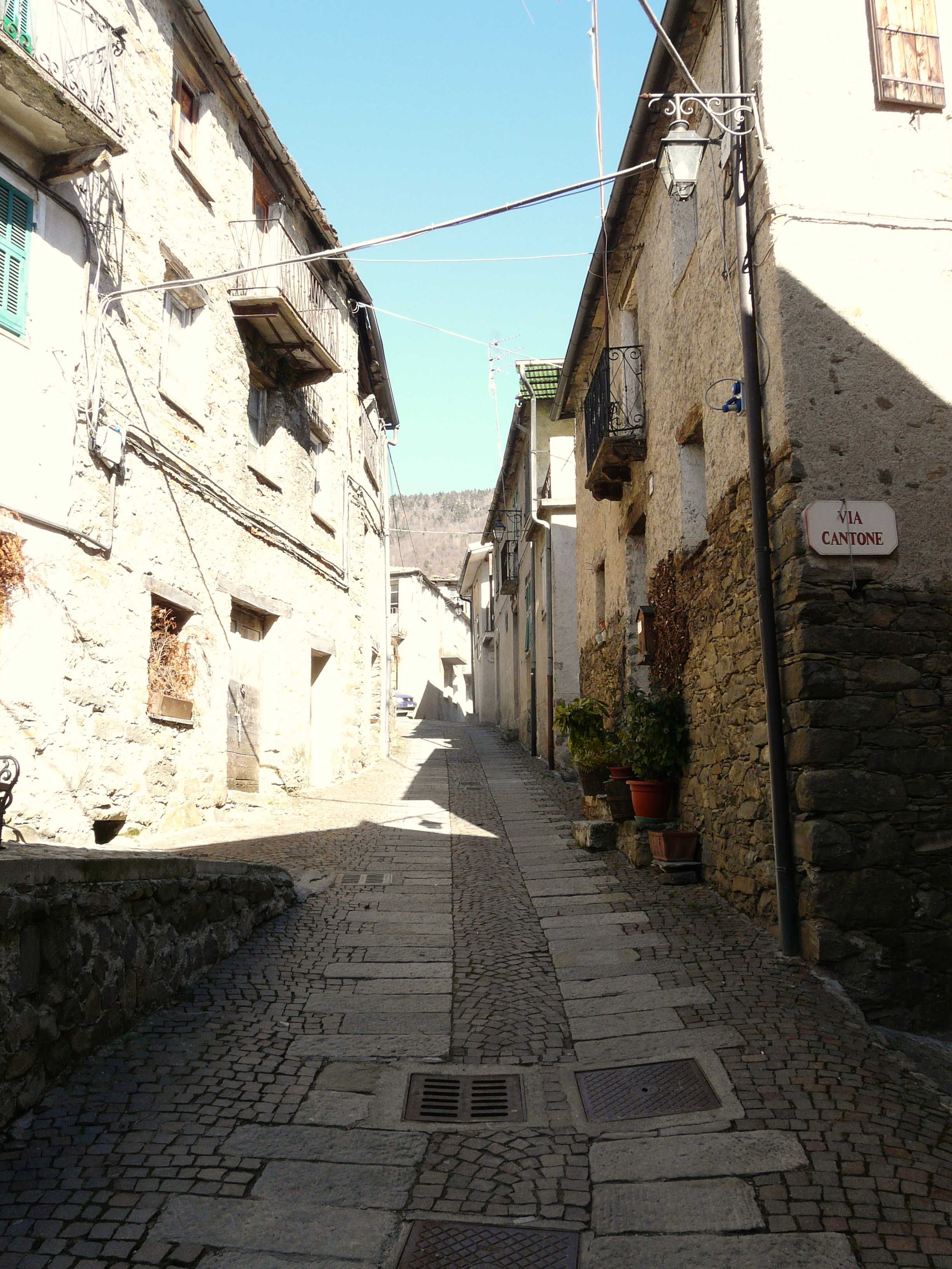 Mendatica, Liguria, Italia